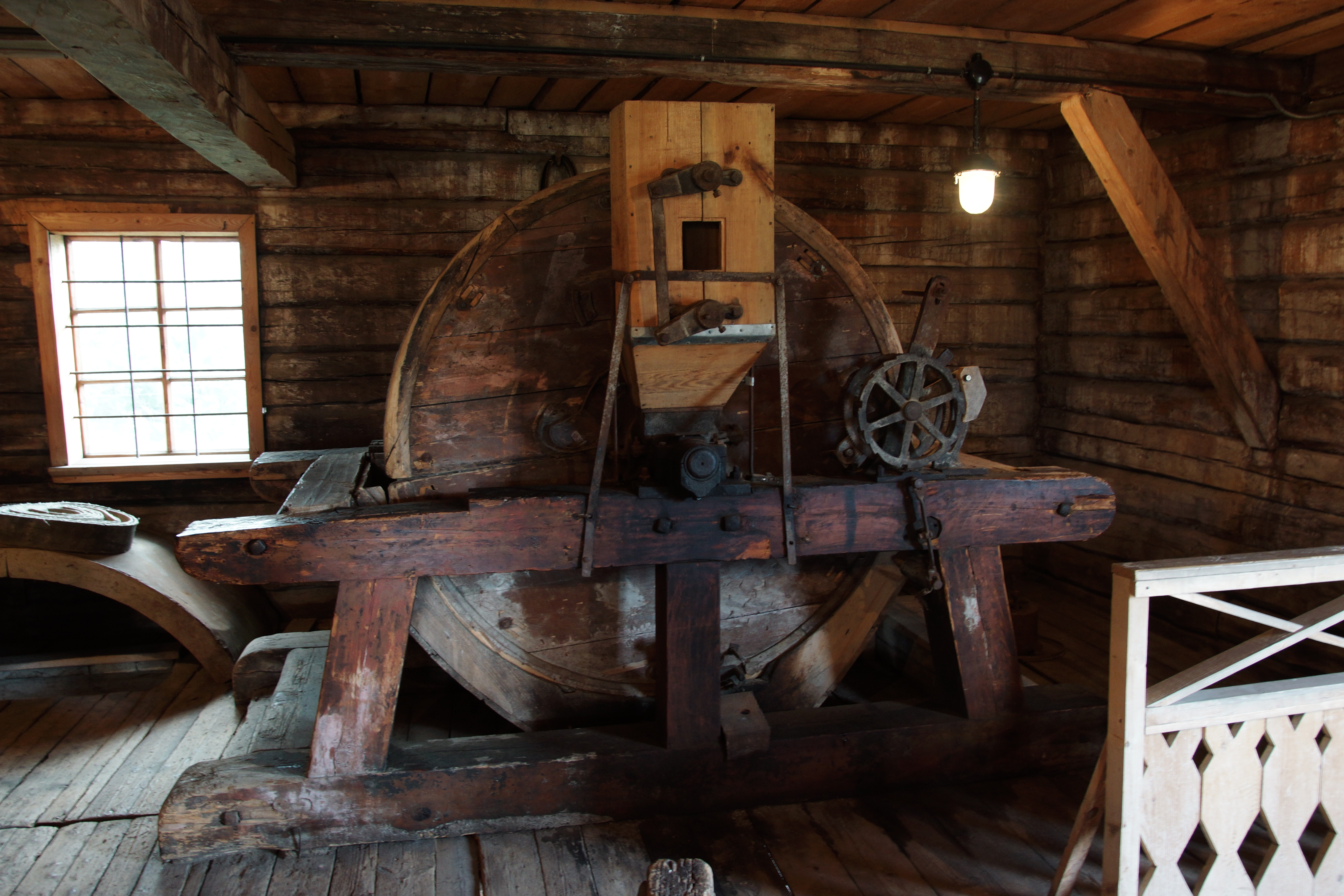 Беларуская (тарашкевіца): Музэефікаваныя аб’екты этнаграфічных комплексаў «Млын» і «Кузьня»:паравы млын дом завозьнікаў сьвіранкузьня. г. Заслаўе This is a photo of Belarusian heritage monument. Reference number: 612Г000334 ( WLM)